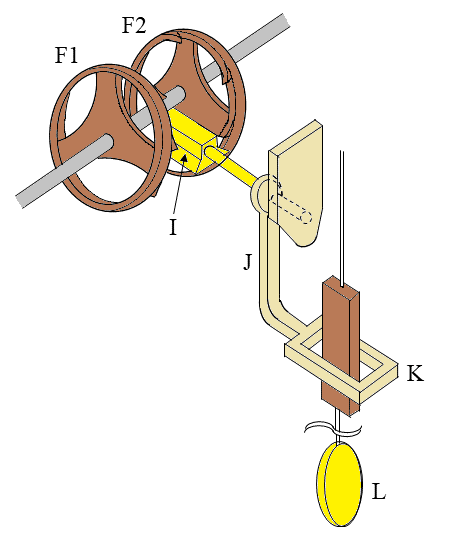 伊能忠敬が使用した垂揺球儀の促球機の構造。浅井忠『垂揺球儀 : 和時計調査報告』、和時計学会、1983年、pp.35,46の写真と図、及び大谷亮吉編著『伊能忠敬』岩波書店、1917年、p.404の図をもとに作成。